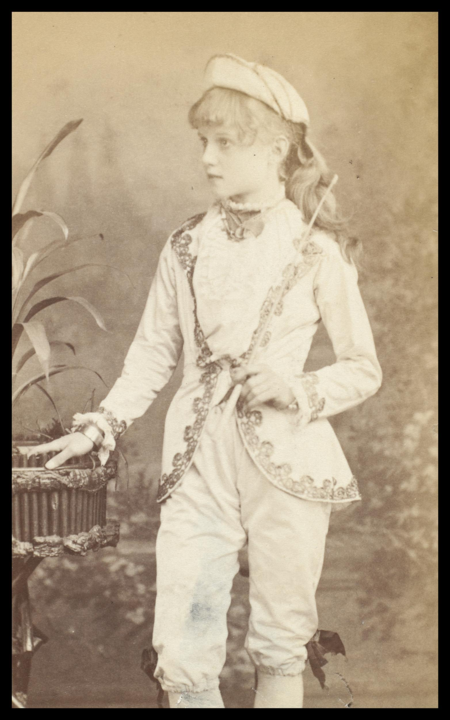 London Stereoscopic Company (photographer).Connie Gilchrist. Sepia photograph on paper. Bequeathed by Guy Little. V&A's collections. Museum number: S.135:347-2007